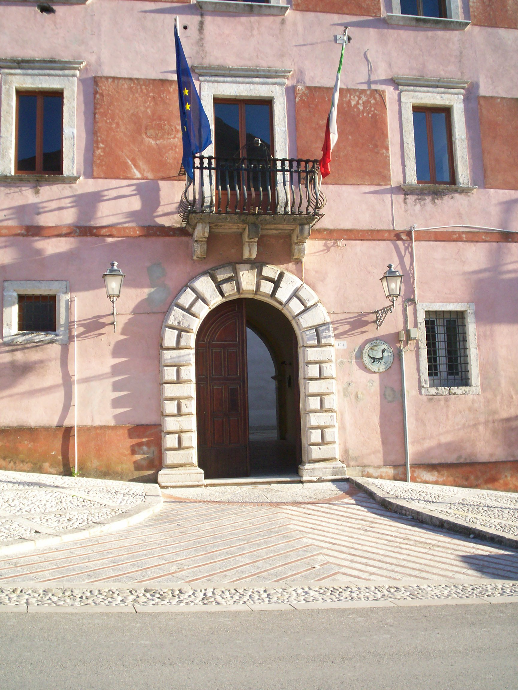 Particolare di Palazzo Giuseppe Ciaburro in Cerreto Sannita